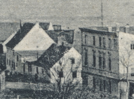 Gasthof zur Fähre i9n Westerhüsen, Aufnahme vermutlich schon in den 1890ern